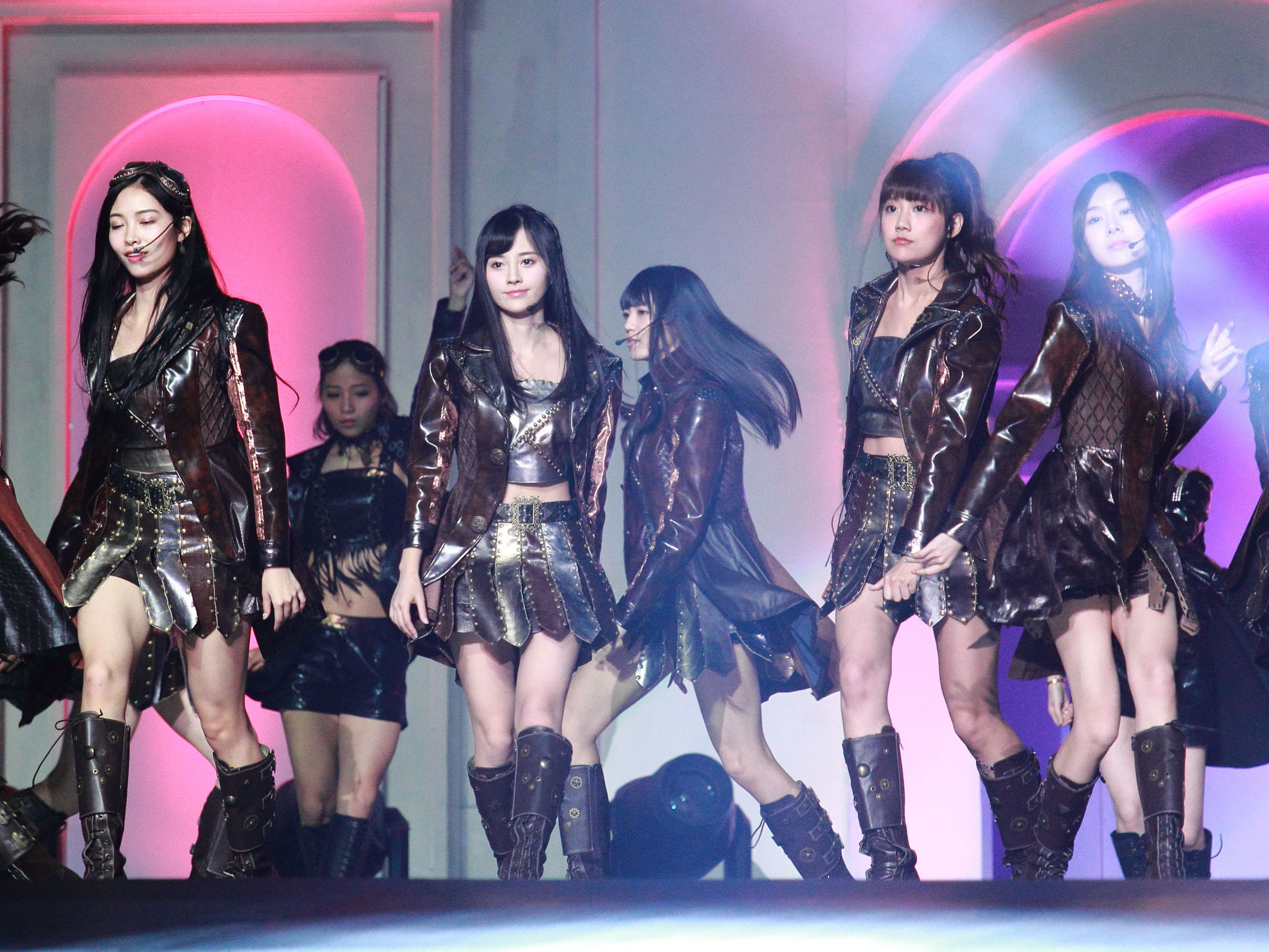 SNH48 第二届总选举